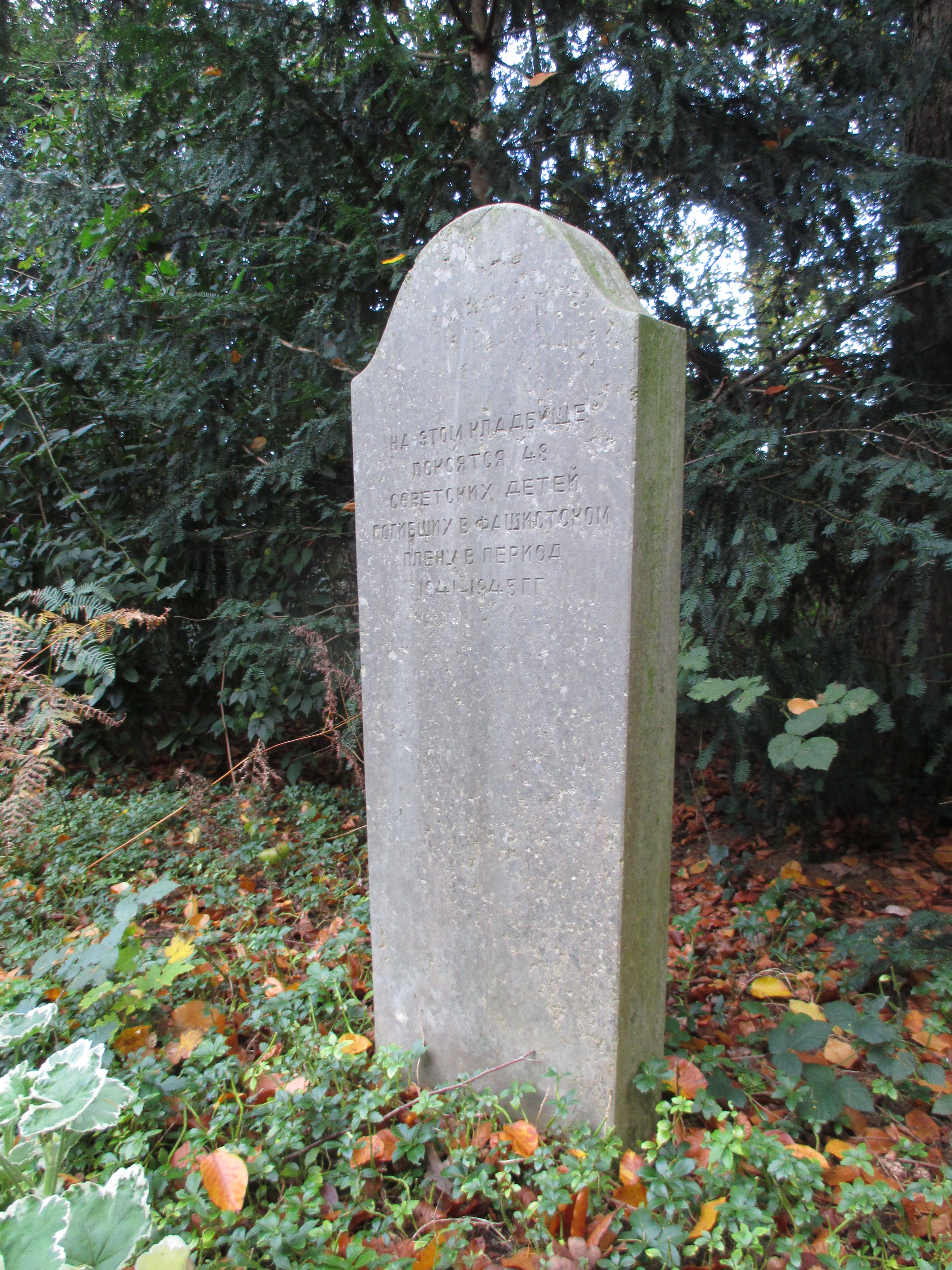 Gedenkstein auf dem Feld der Kindergräber der russischen Zwangsarbeiter.